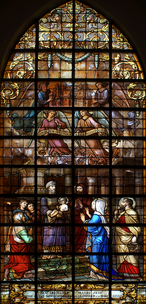 Glasraam in de koorommegang, gemaakt door J.B. Capronnier, anno 1884. Gift van mevrouw Henrica Van Genechten.